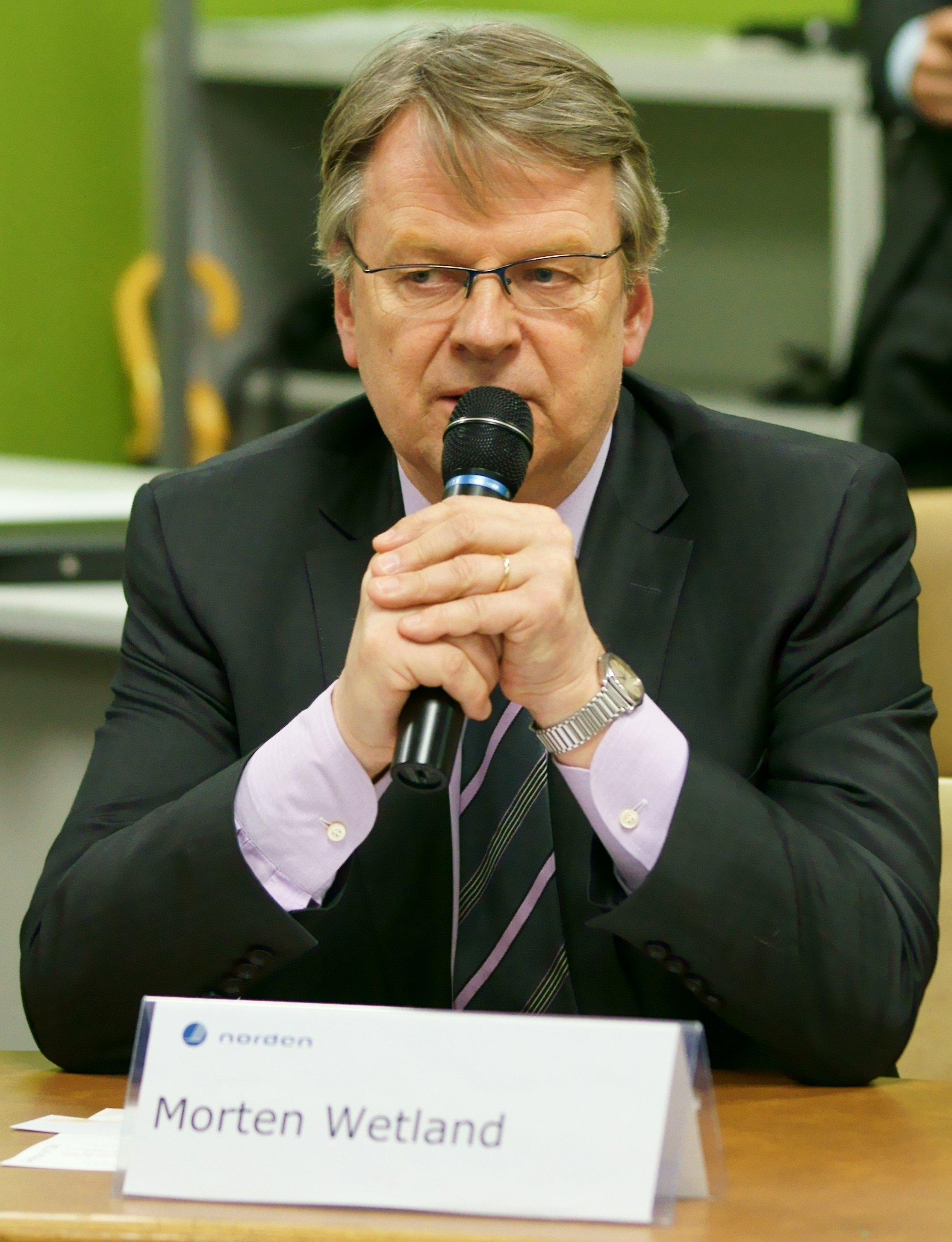 Norges FN-ambassadør under det nordiske side-eventet i FN under FNs kvinnekommisjons sesjon (CSW56) 2012.